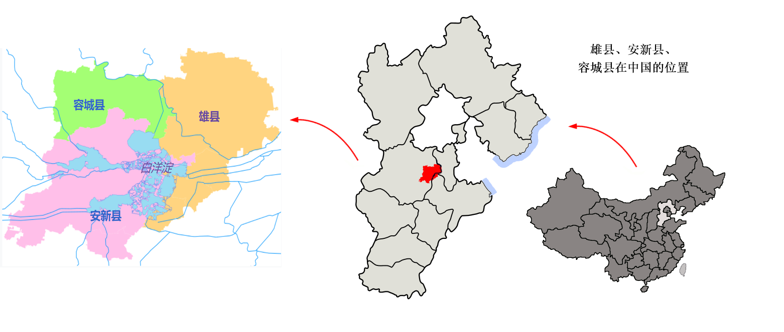 雄县、安新县、容城县在中国的位置